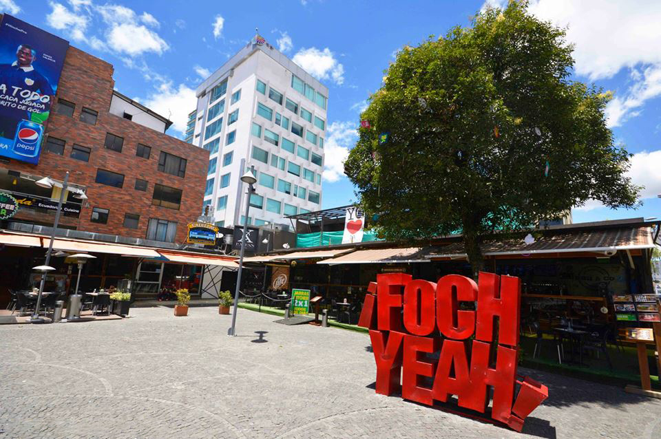 Imagen panoramica de la Plaza Foch